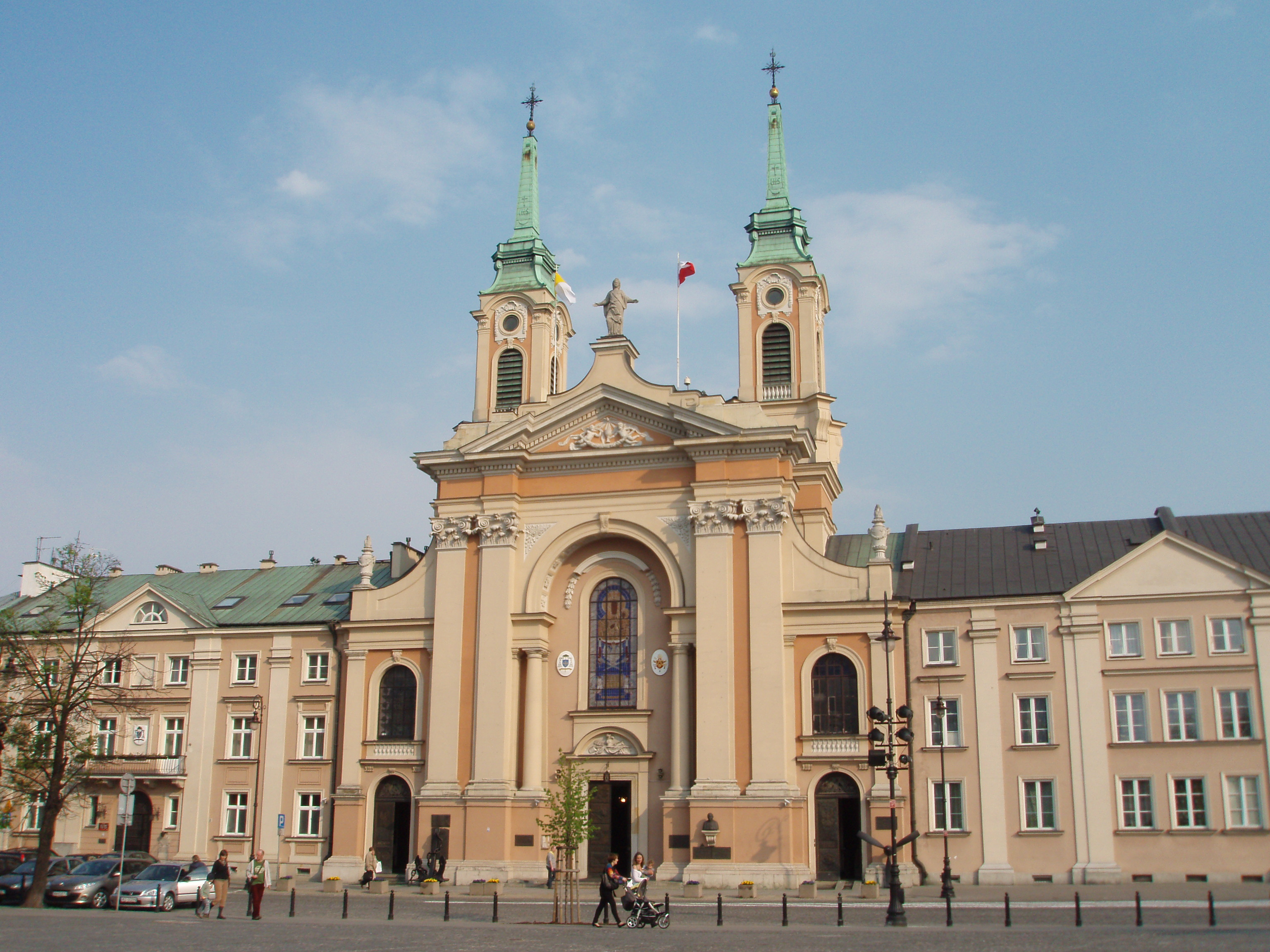 Katedra Polowa Wojska Polskiego